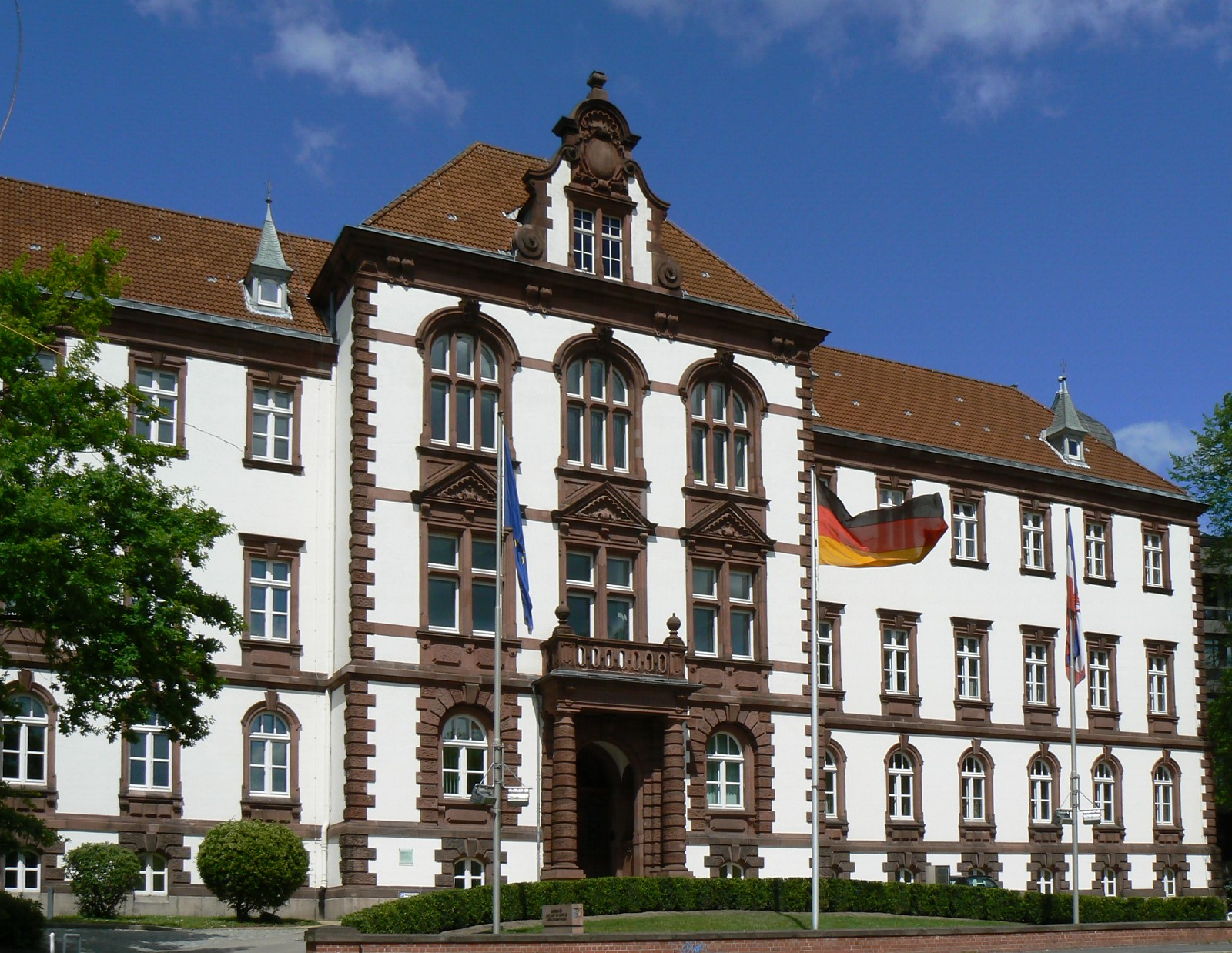 Ehemaliges Oberlandesgericht in Kiel (am Kleinen Kiel). Im deutschen Renaissancestil gebaut von 1890-1894. Architekt: Walter Hesse. Heute: Ministerium für Justiz, Arbeit und Europa.